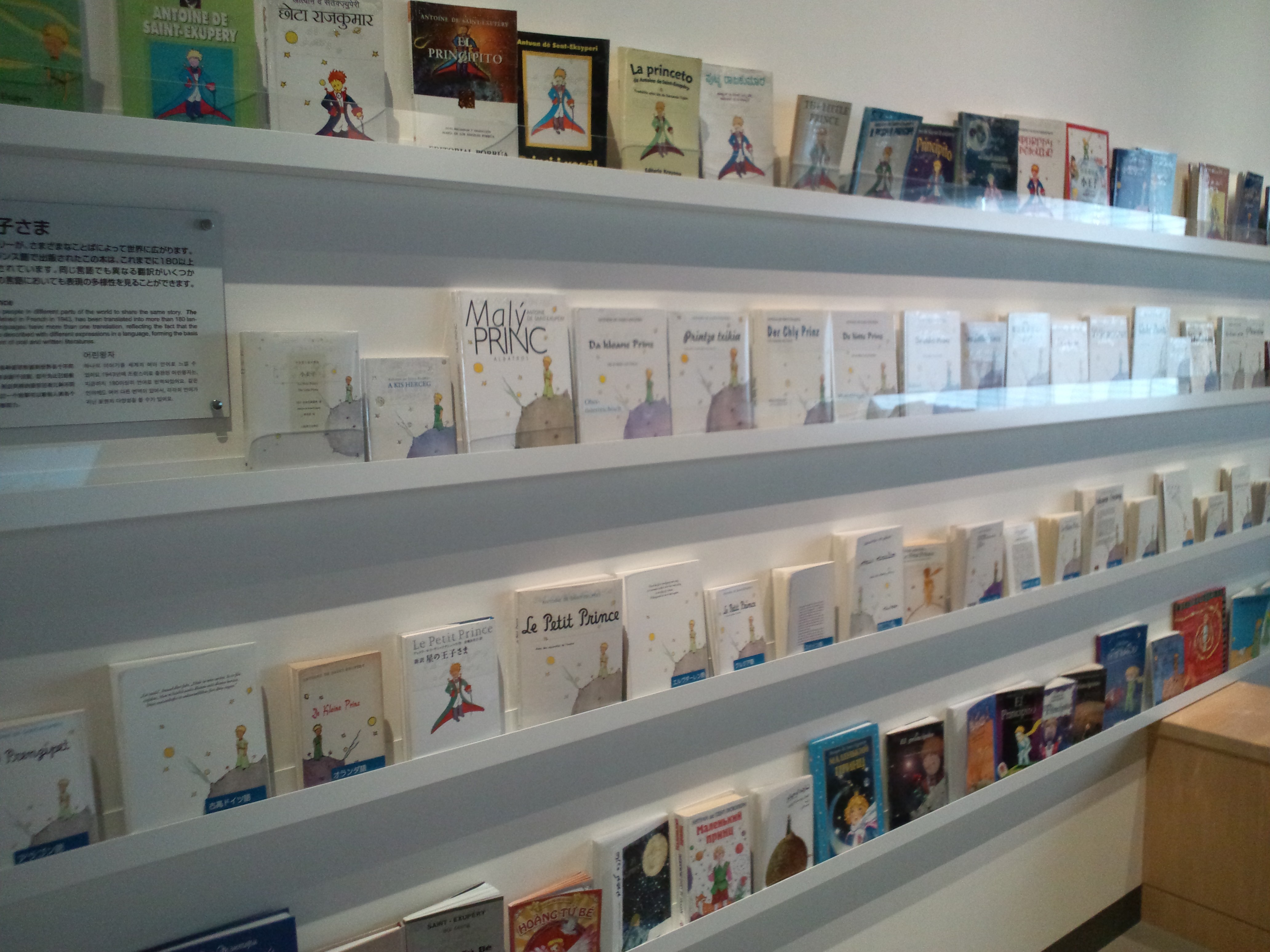 国立民族学博物館（大阪） 「星の王子さま」のコレクション